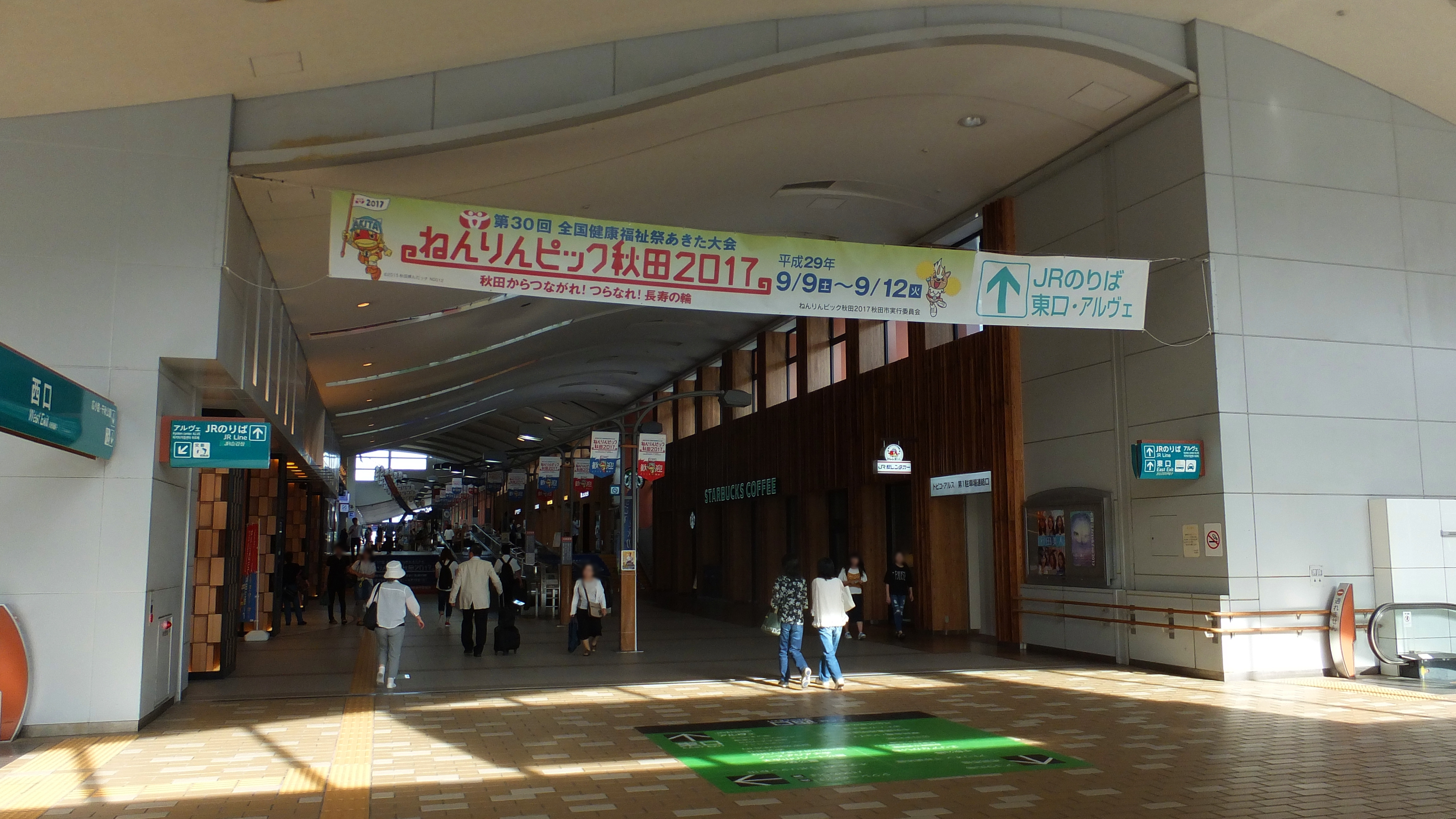 秋田駅東西自由通路「ぽぽろーど」